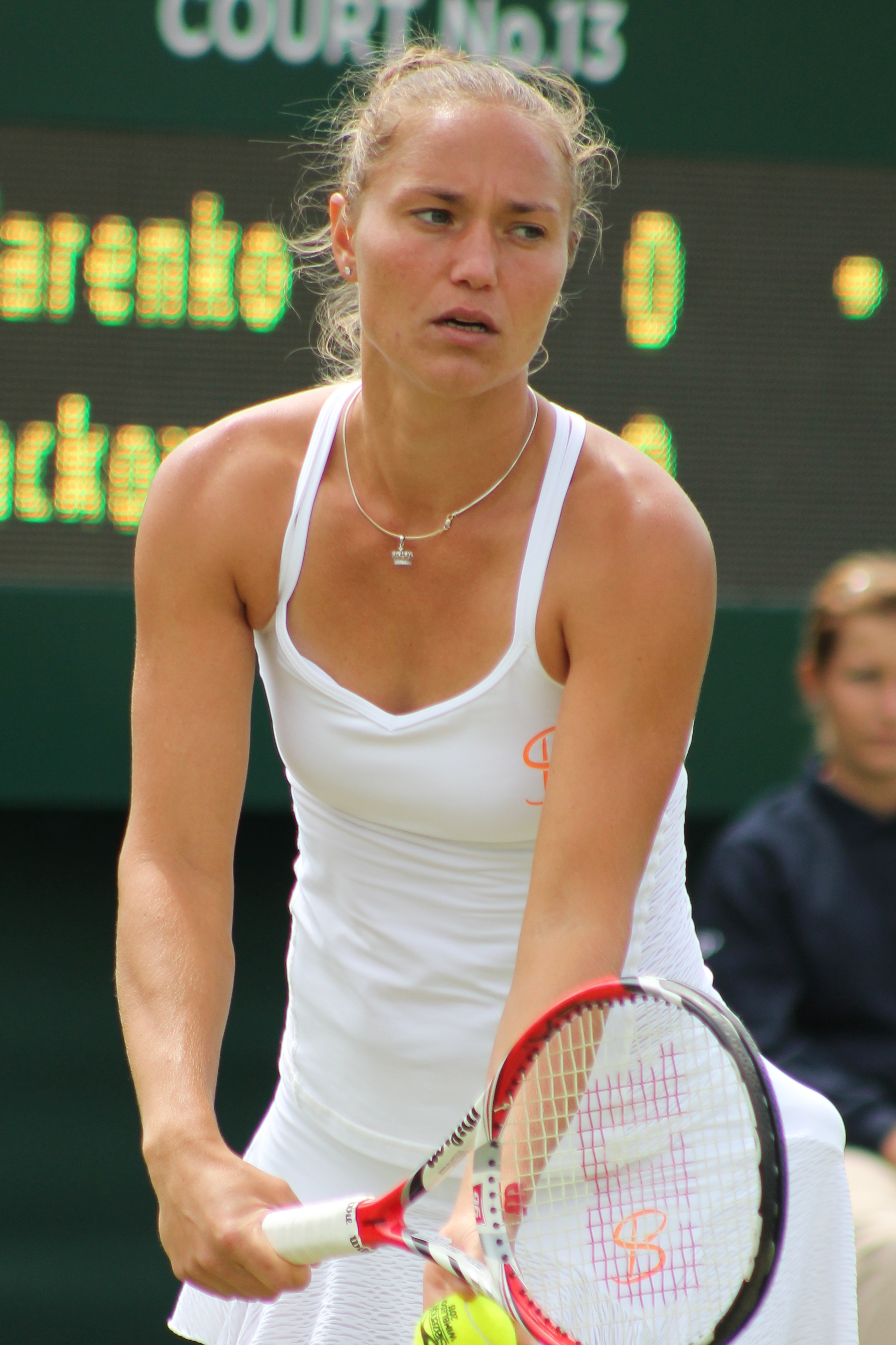 Bondarenko K. WMQ15 (3)